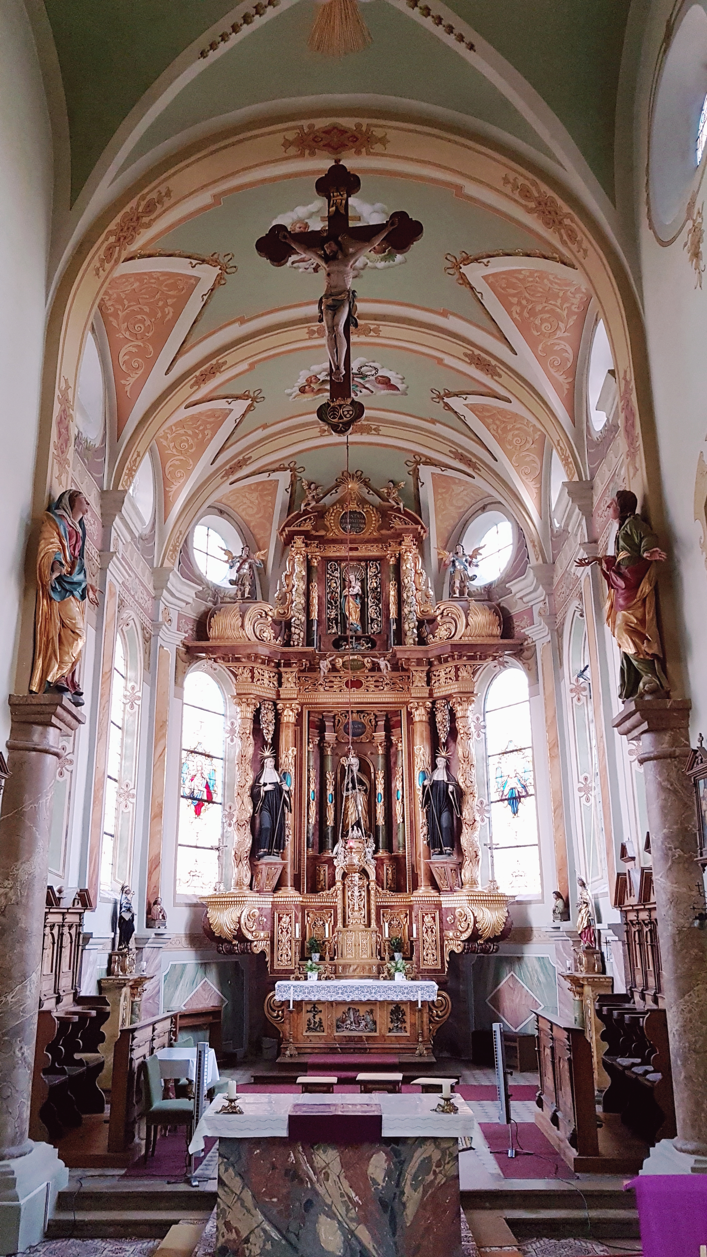 Hörmannshofen (Biessenhofen), Wallfahrtskirche St. Ottilia, Chor mit Hochaltar und Triumphbogenkreuz.